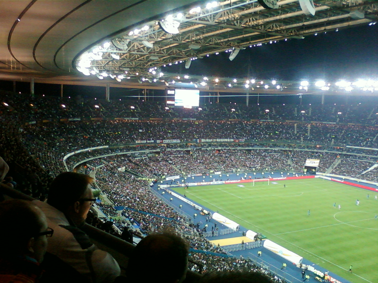 Tribune des supporters de l'Olympique Lyonnais lors du match Lyon-Marseille du